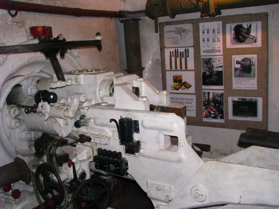 Пушка ЗИФ-26 в правом боевом каземате.